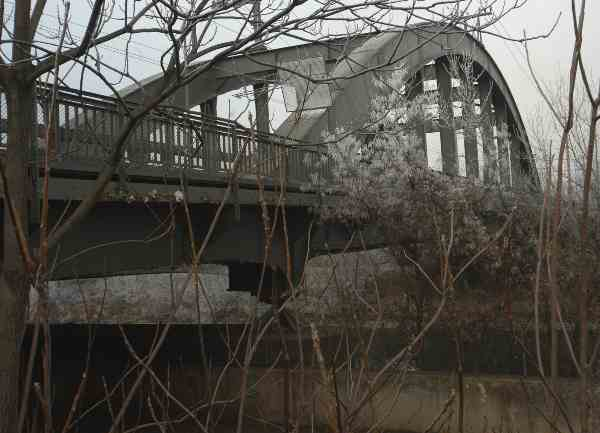 Die Ostbahnbruecke ueber den Donaukanal in Wien